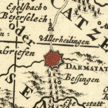 Ausschnitt aus der Karte "Moguntini Archiepiscopat' et Electoratus" von Nicolaes Jansz. Visscher (1649-1702) mit "Allerheilingen" (Arheilgen) und "Bessingen" (Bessungen)